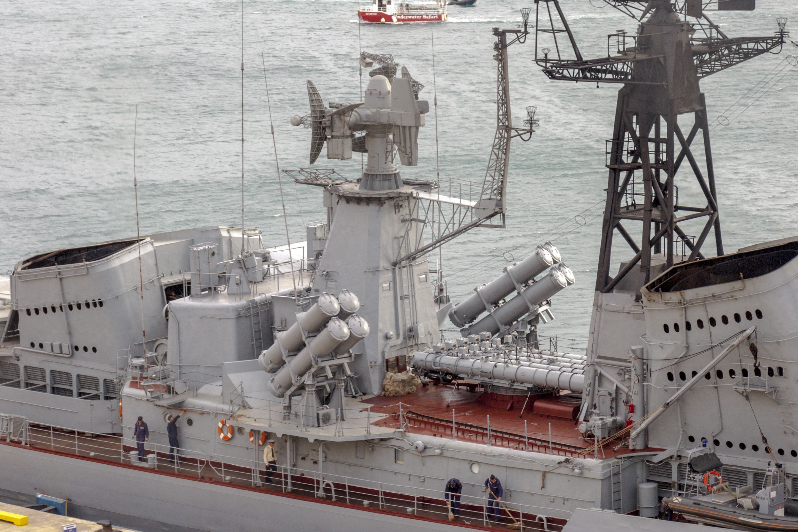 Сторожевой корабль "Сметливый" в Валлетте. ПКР "Уран"